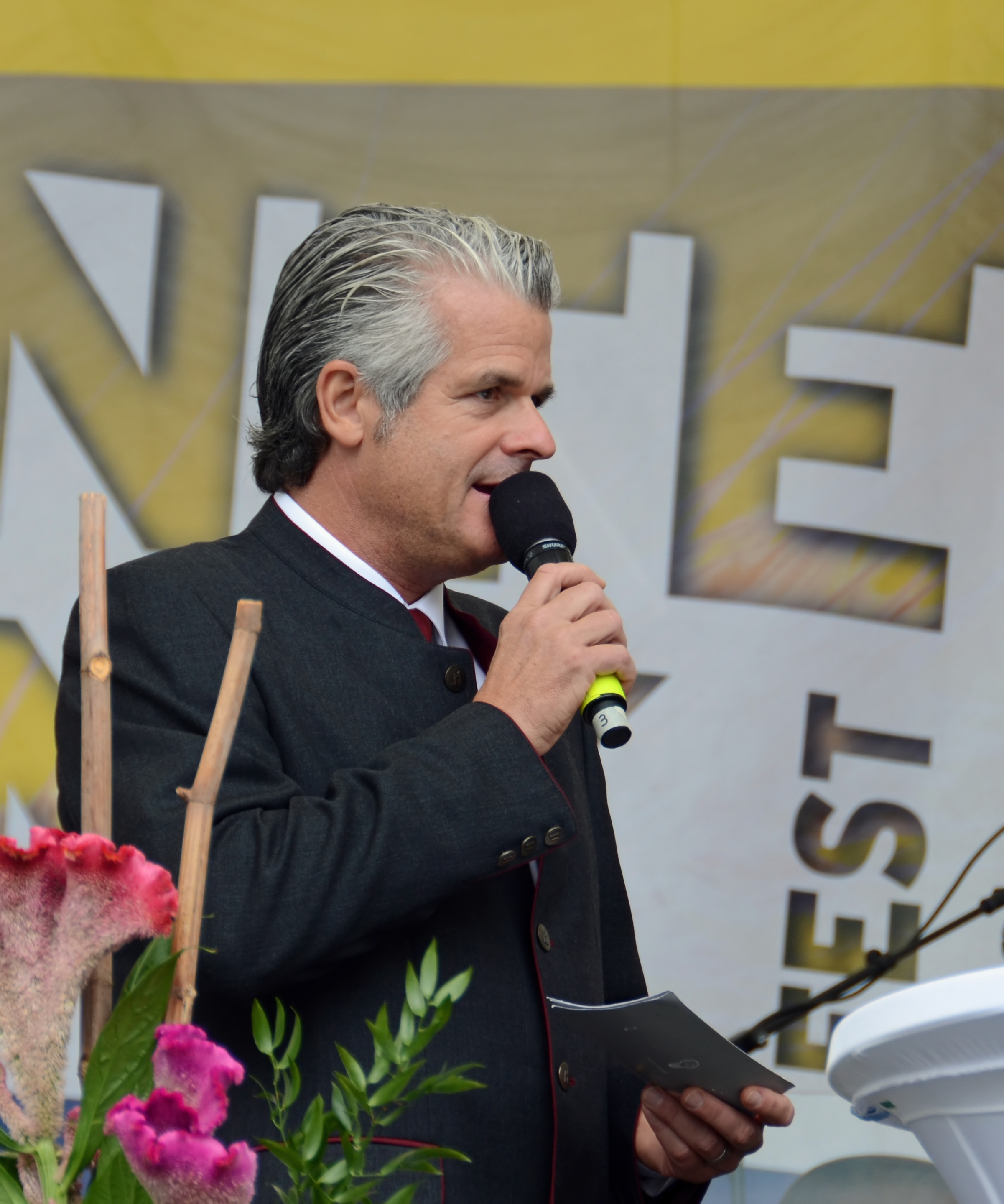 Wolfram Pirchner, Österreichischer Fernsehmoderator.